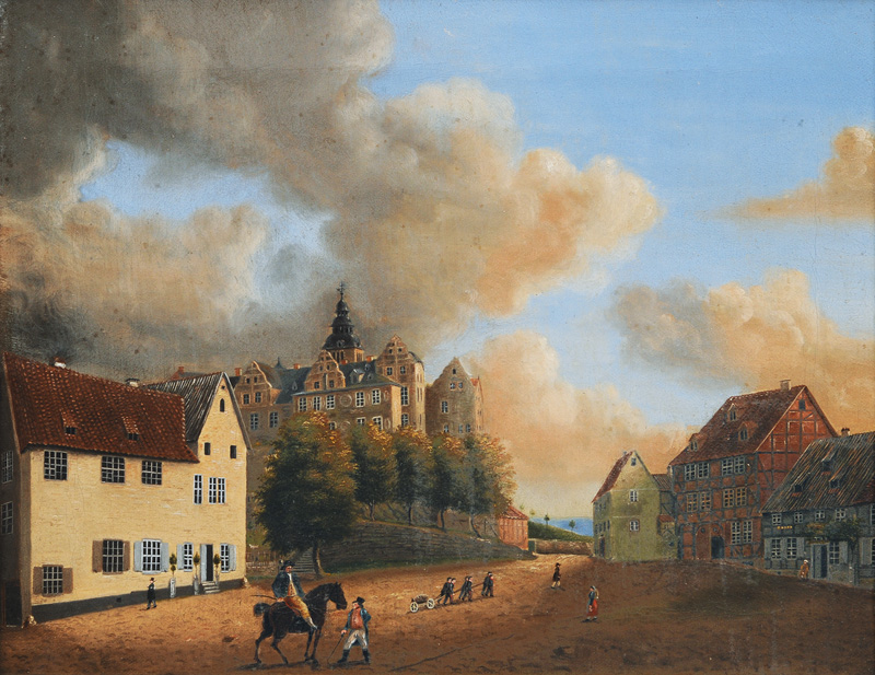 Vor dem Schloss von Quedlinburg. Öl auf Leinwand, 24,5 x 31 cm, signiert